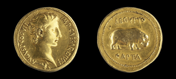 Medallón de Oro de Augusto (Roma. Imperio). Número de inventario: 1921_9_1.